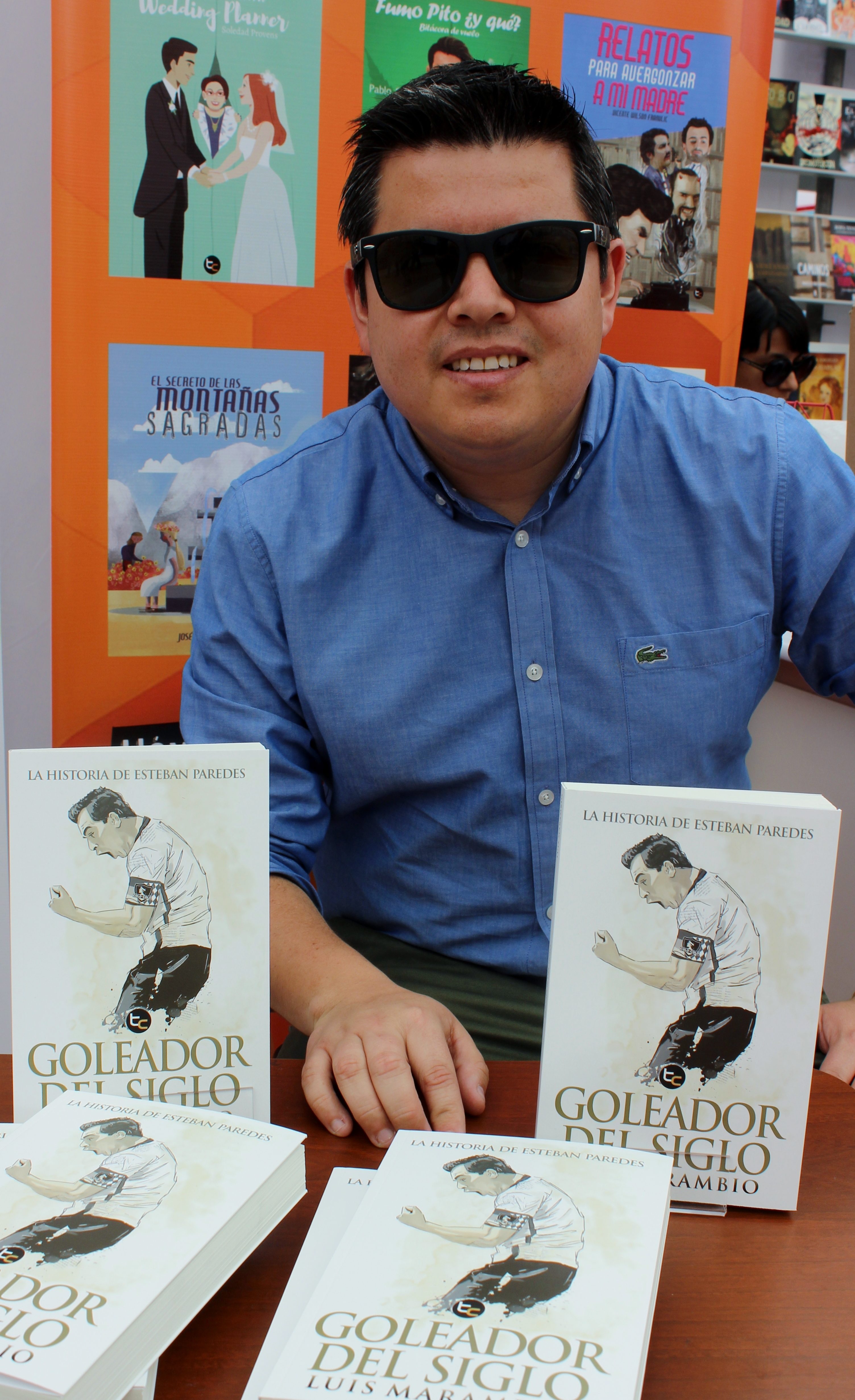 El periodista deportivo chileno Luis Marambio durante una sesión de firmas de su libro sobre Esteban Paredes, Goleador del siglo, en la Feria Internacional del Libro de Santiago 2018.